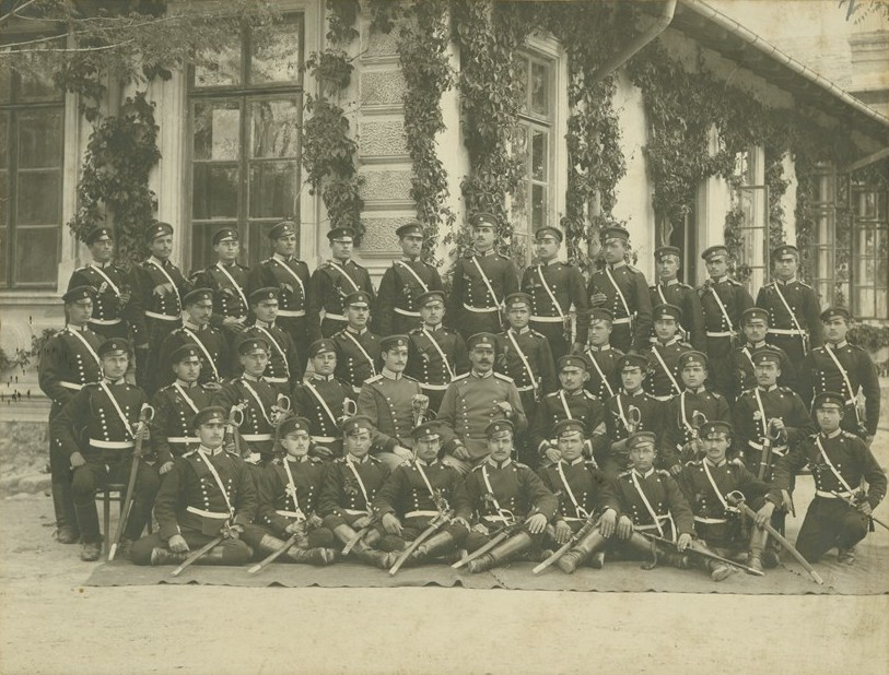 Трети ескадрон от Втори конен полк. В средата е подполковник Игнат Кикименов.